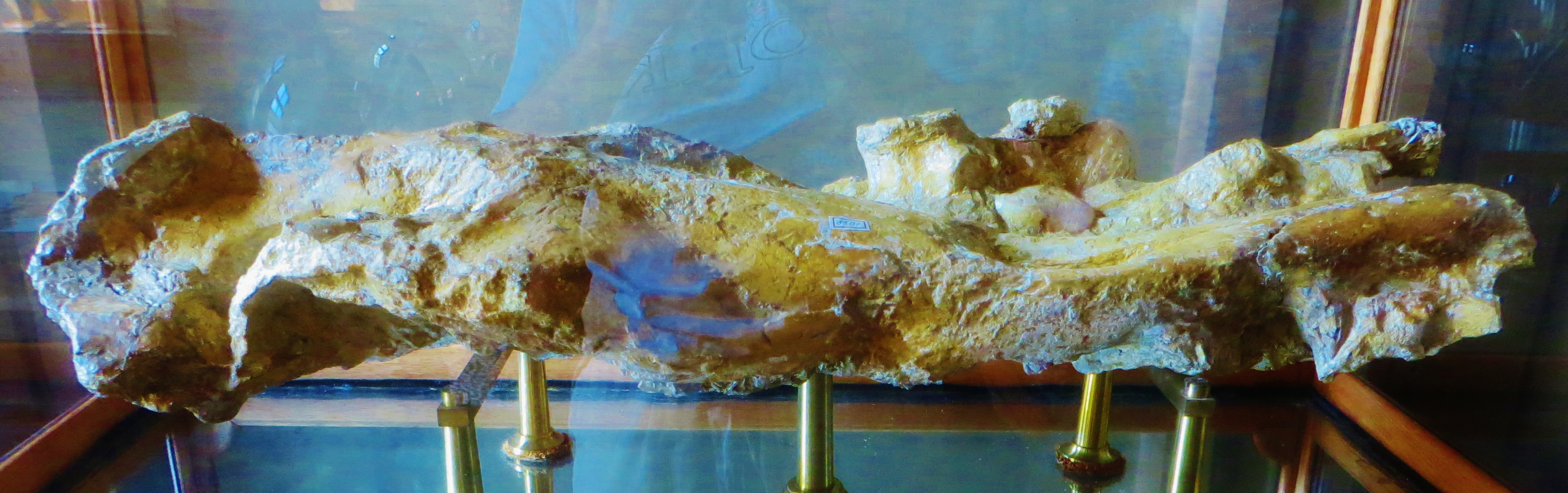 Fossil of Zygorhiza, an extinct mammal- Took the picture at Teylers Museum, Haarlem